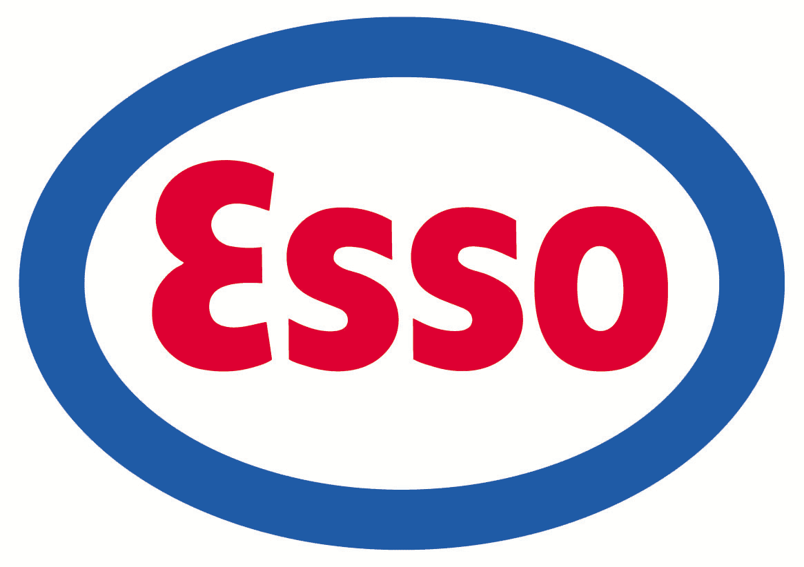 Logo de Esso.